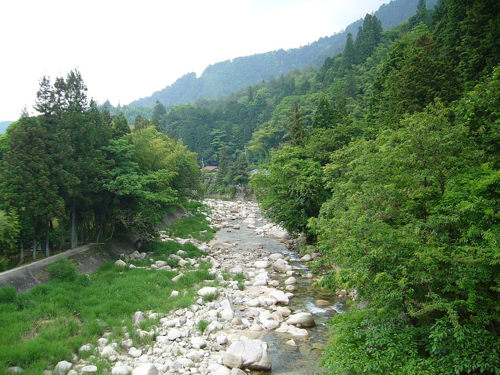 蘭川 田島橋から妻籠宿方面を望む